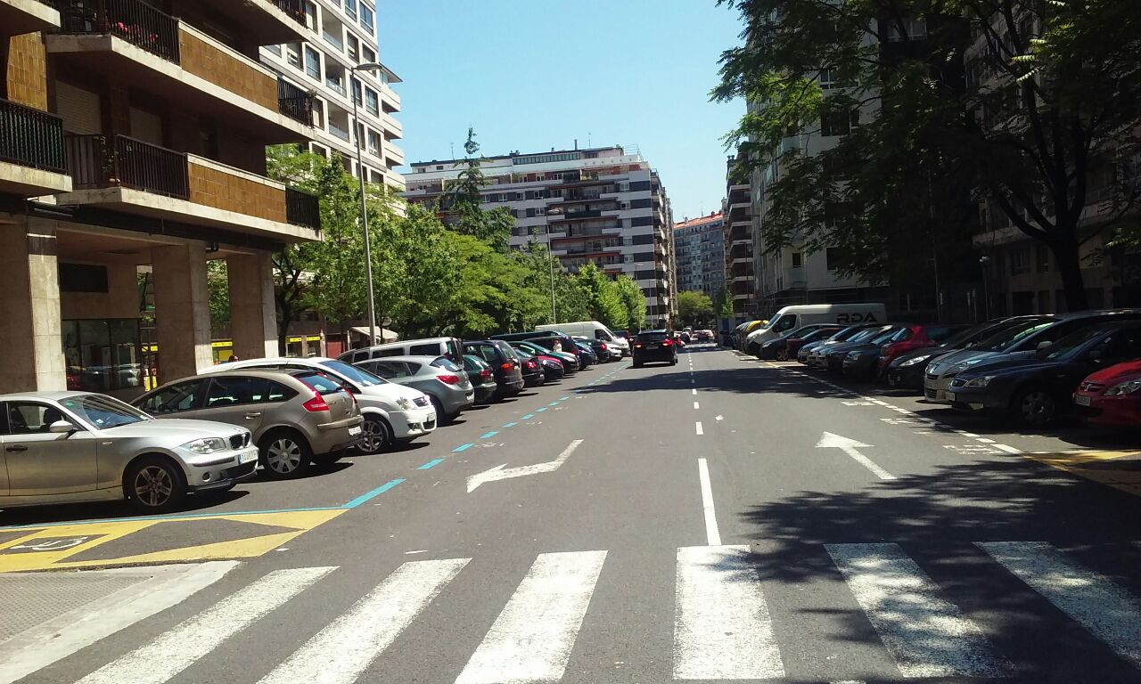 Katalina erauso kalearen ikuspegia, errondo pasealekutik begiratuta